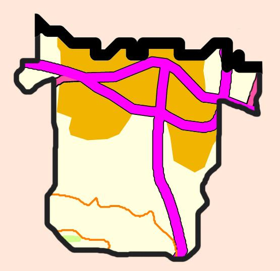 Συνοπτική παρουσίαση της Κερύνειας